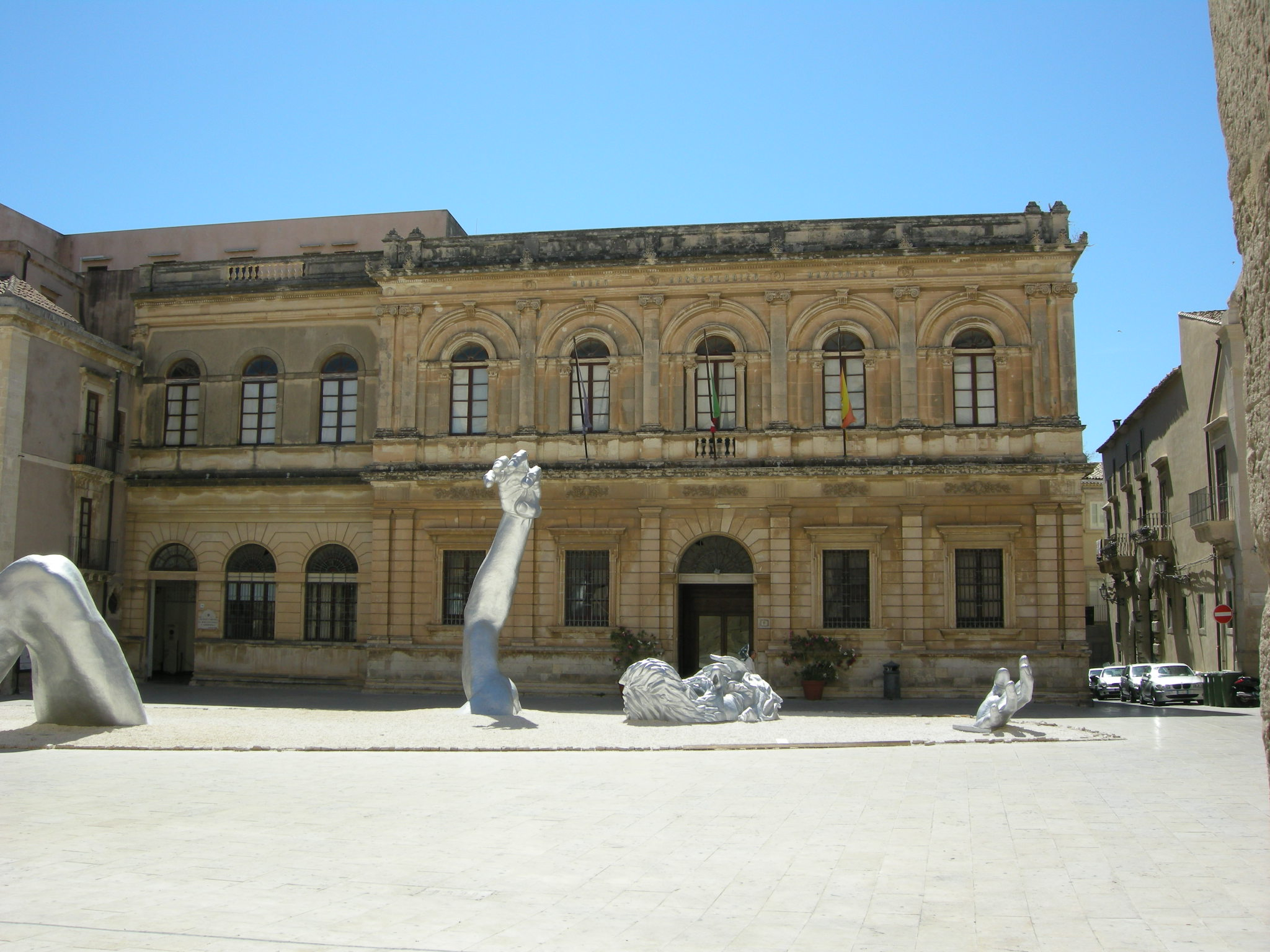 Ortigia, palazzo soprintendenza